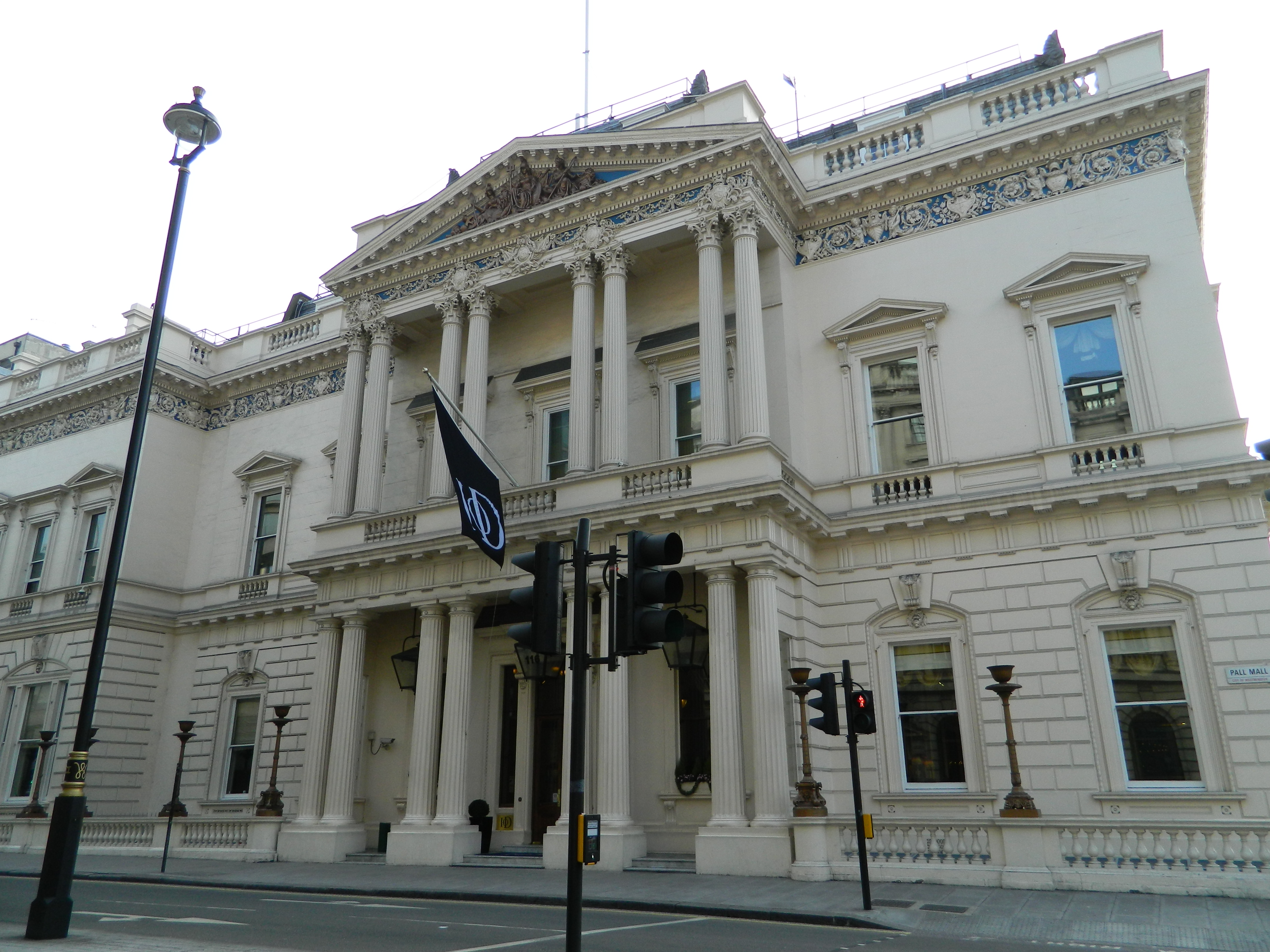 London